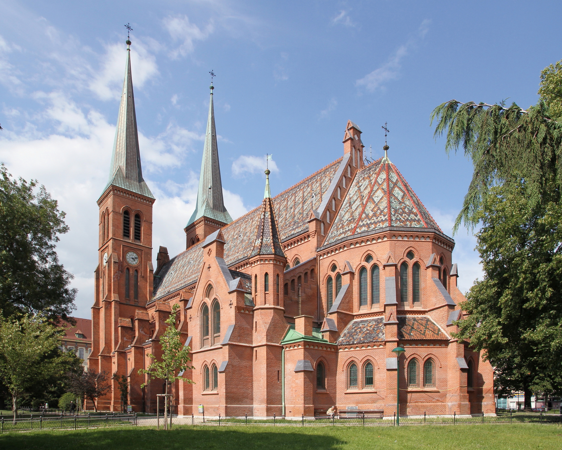 Die röm.-kath. Pfarrkrich hl. Brigitta im 20. Wiener Gemeindebezirk Brigittenau. Der Backsteinbau mit bunt glasiertem Ziegeldach im „italienisch-neugotischem Stil" wurde ab 1867 nach Plänen des Architekten Fiedrich Schmidt erbaut und am 31. Mai 1874 durch Kardinal Rauscher geweiht.